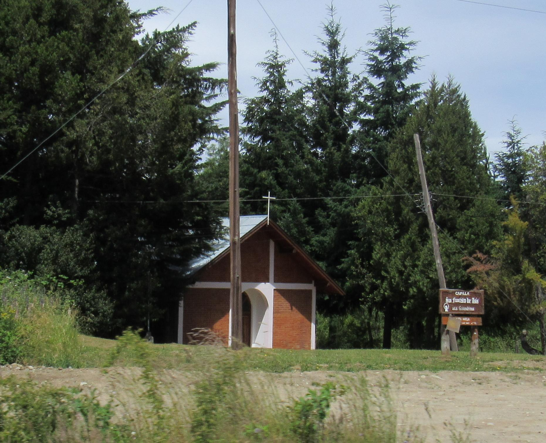 Capilla San Francisco de Asís, Las Golondrinas, Chubut, desde la Ruta 40